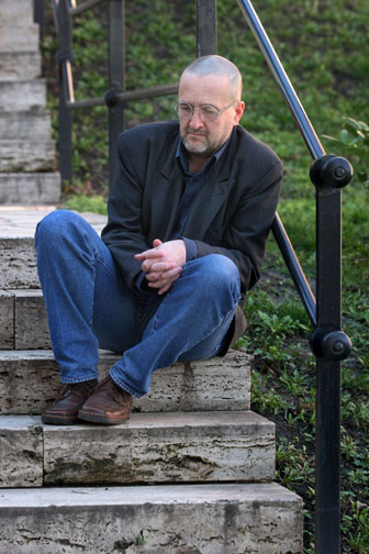 Image de Andras Petöcz. Je suis l'auter de cette image, c'est moi, qui l'ai fait : Andras Szokolay |jour=6|mois=février|année=2008